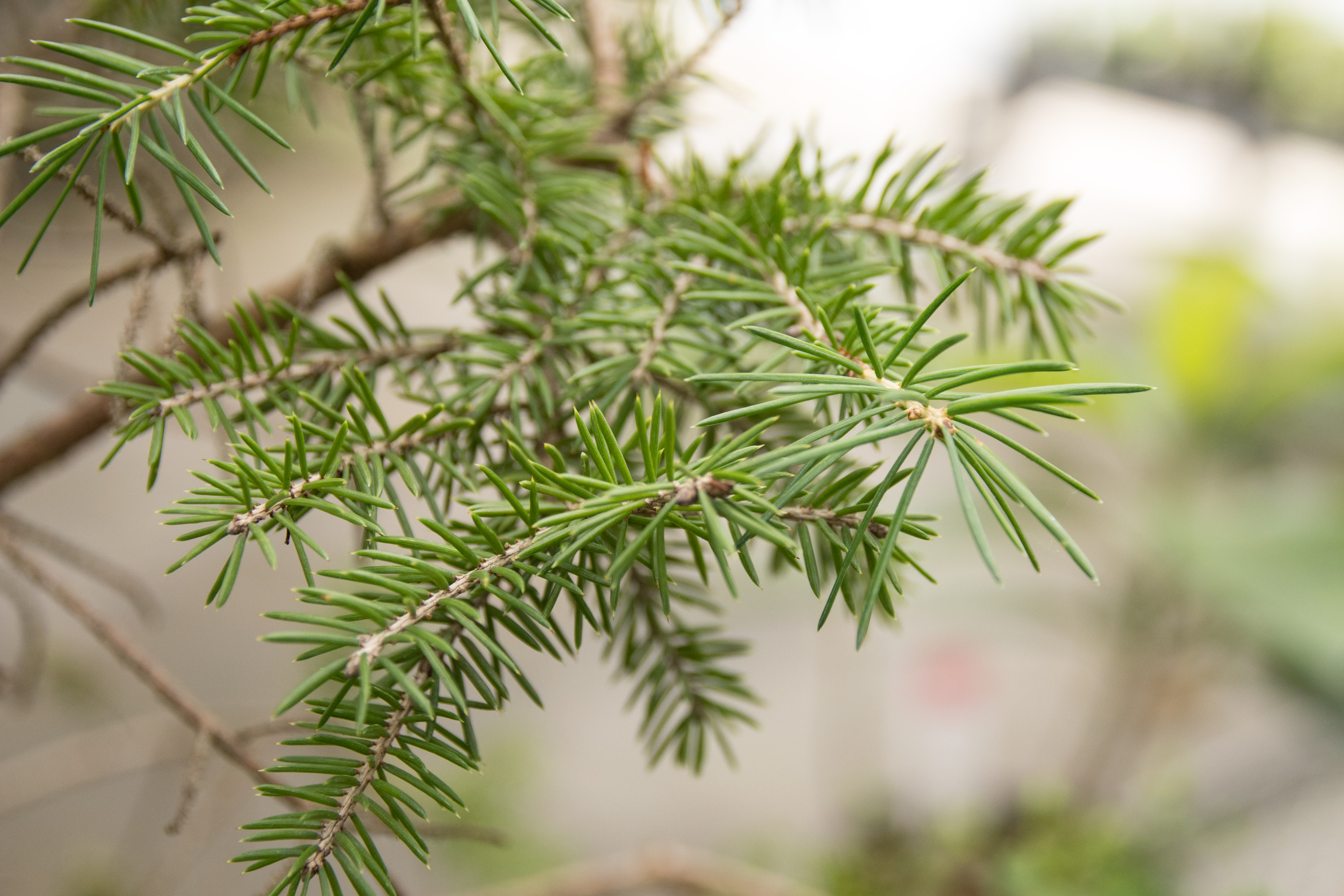 ヒメバラモミ (学名:Picea maximowiczii)